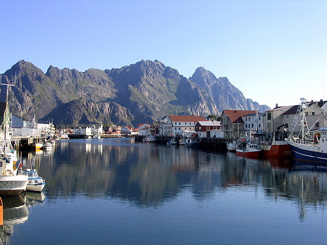 Henningsvær